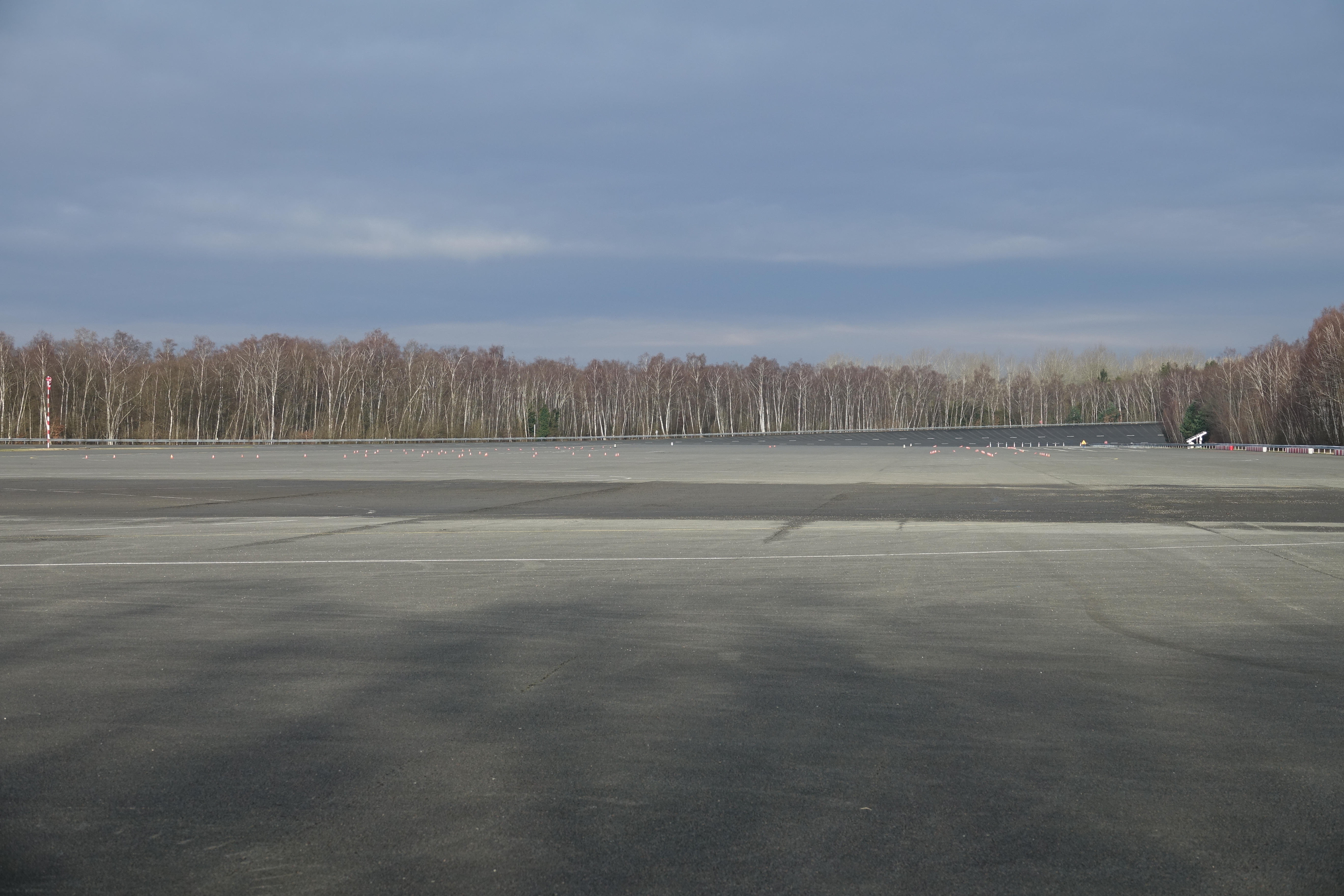 Circuit de Mortefontaine (CERAM)